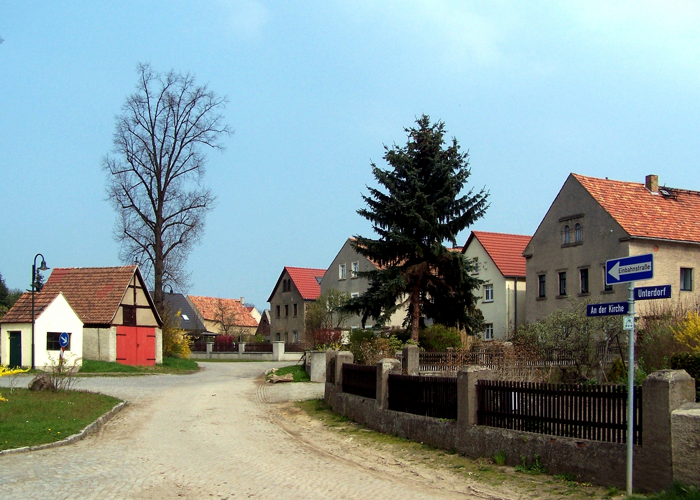 Ortsansicht Bärwalde, Gemeinde Radeburg, Landkreis Meißen